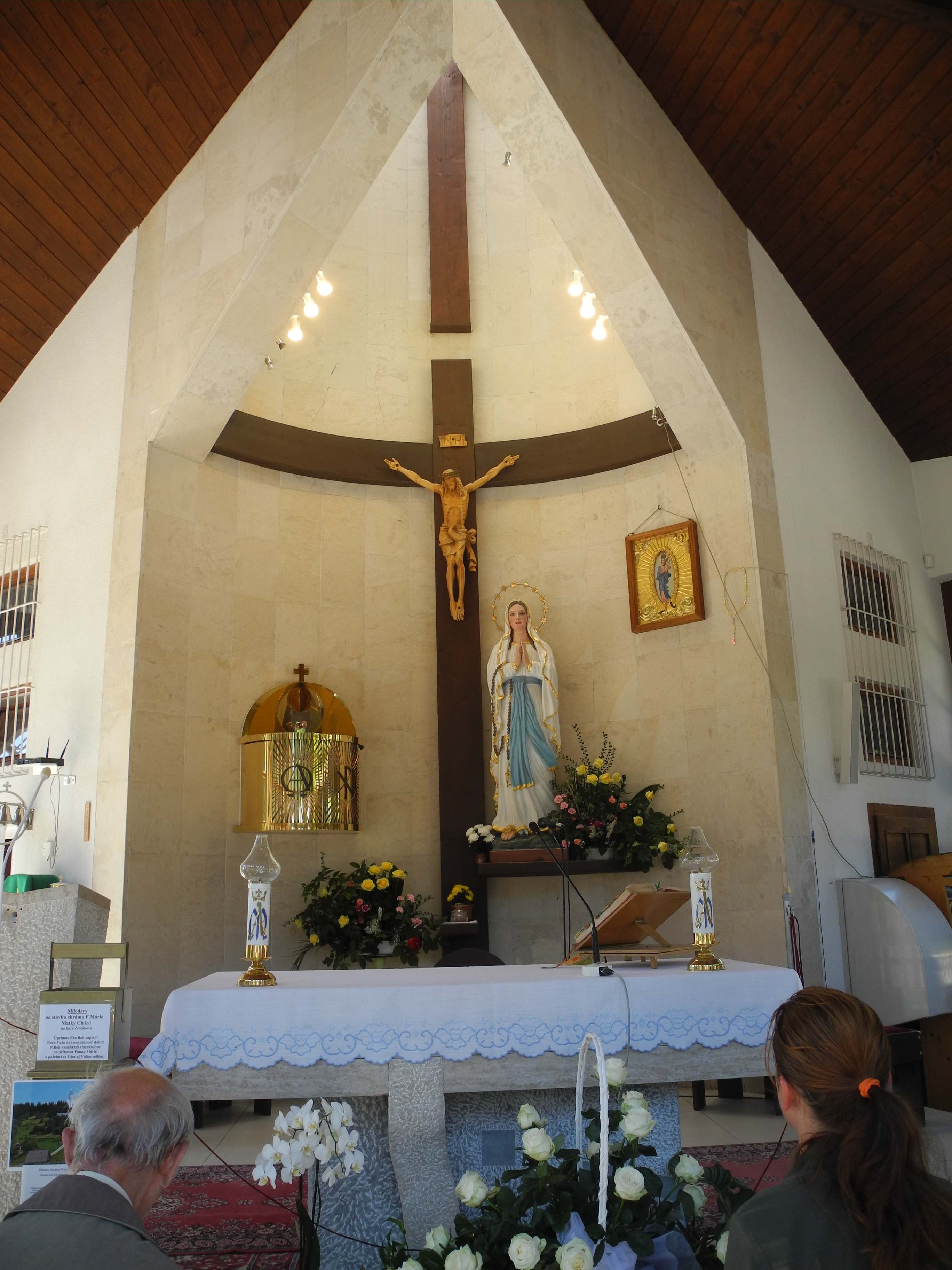 Vnitřek kaple Panny Marie (Turzovka)